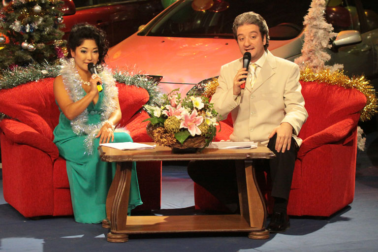 Маржан Казыбаева, Сергей Погосян